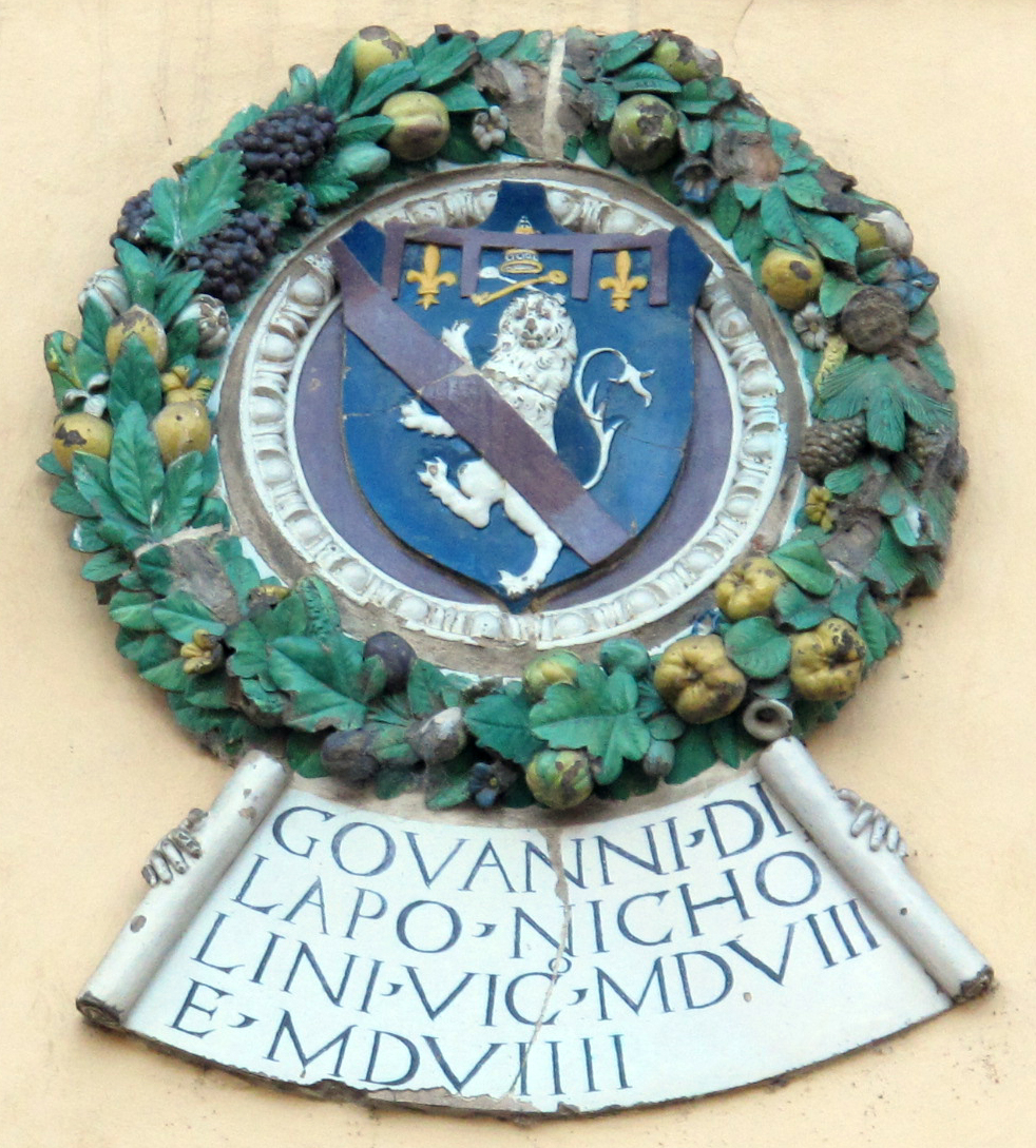 Palazzo d'Arnolfo, stemma giovanni di lapo niccolini, 1508-1509